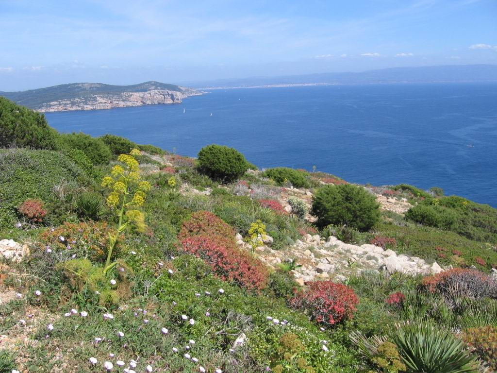 Capo Caccia, Sardinia, Italy. Foto: Mihai Sorin Sirbu